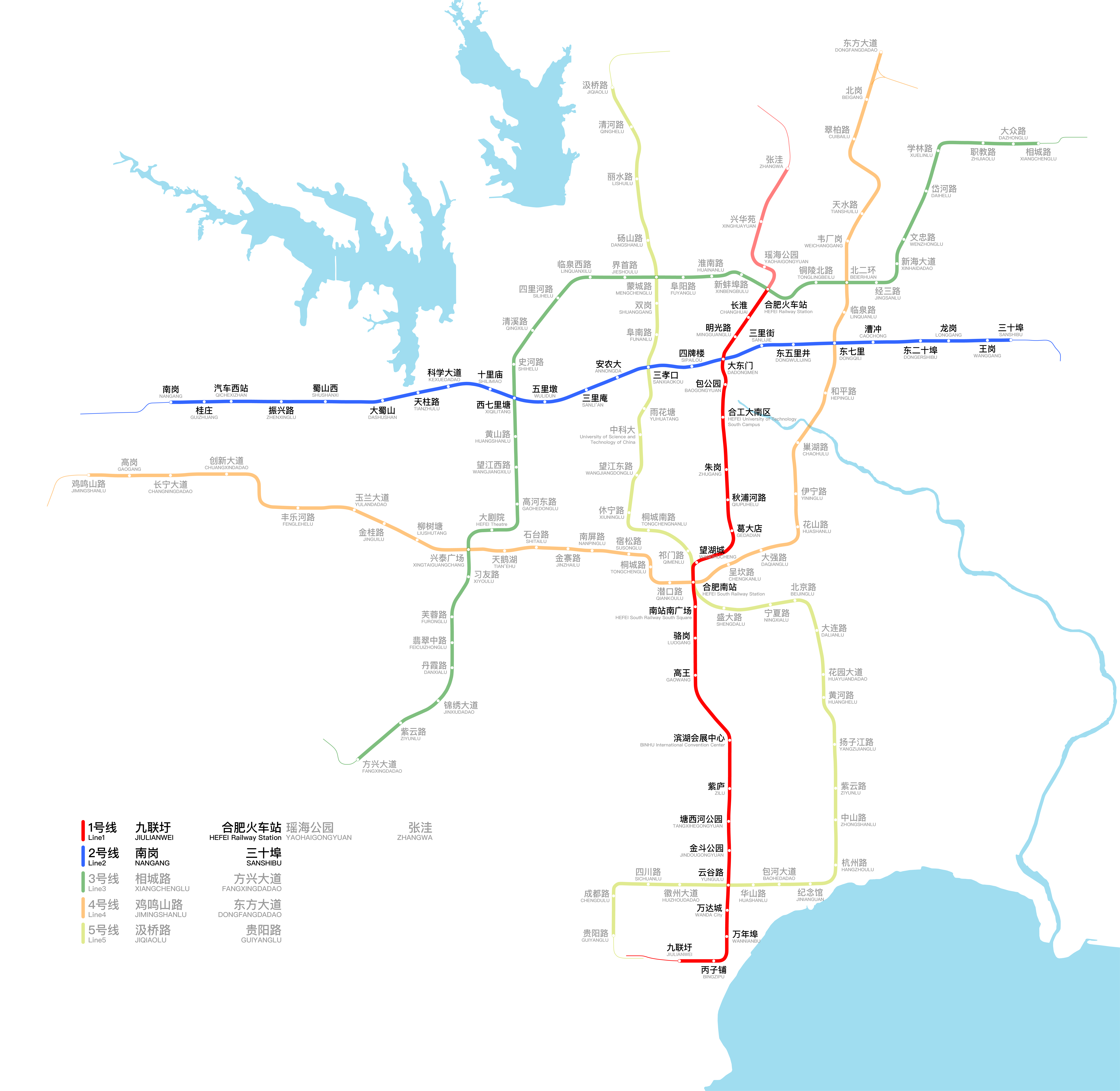 合肥地铁规划线路图，浅色为在建线路，更新于2018年6月